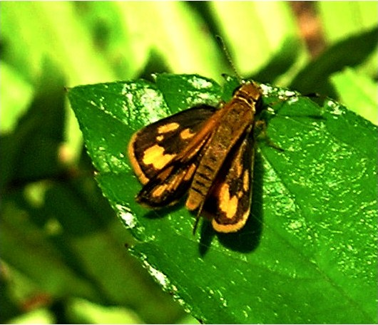 Taractrocera luzonensis in Mindanao, Philippines